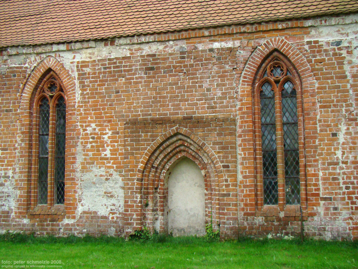 Dorfkirche in Sietow, ehemaliges Nordportal